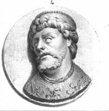 Album du Dauphiné - tome IV, litographie des Dauphins : 4. Guigues IV